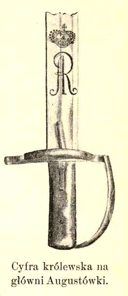 "Cyfra królewska na główni Augustówki"